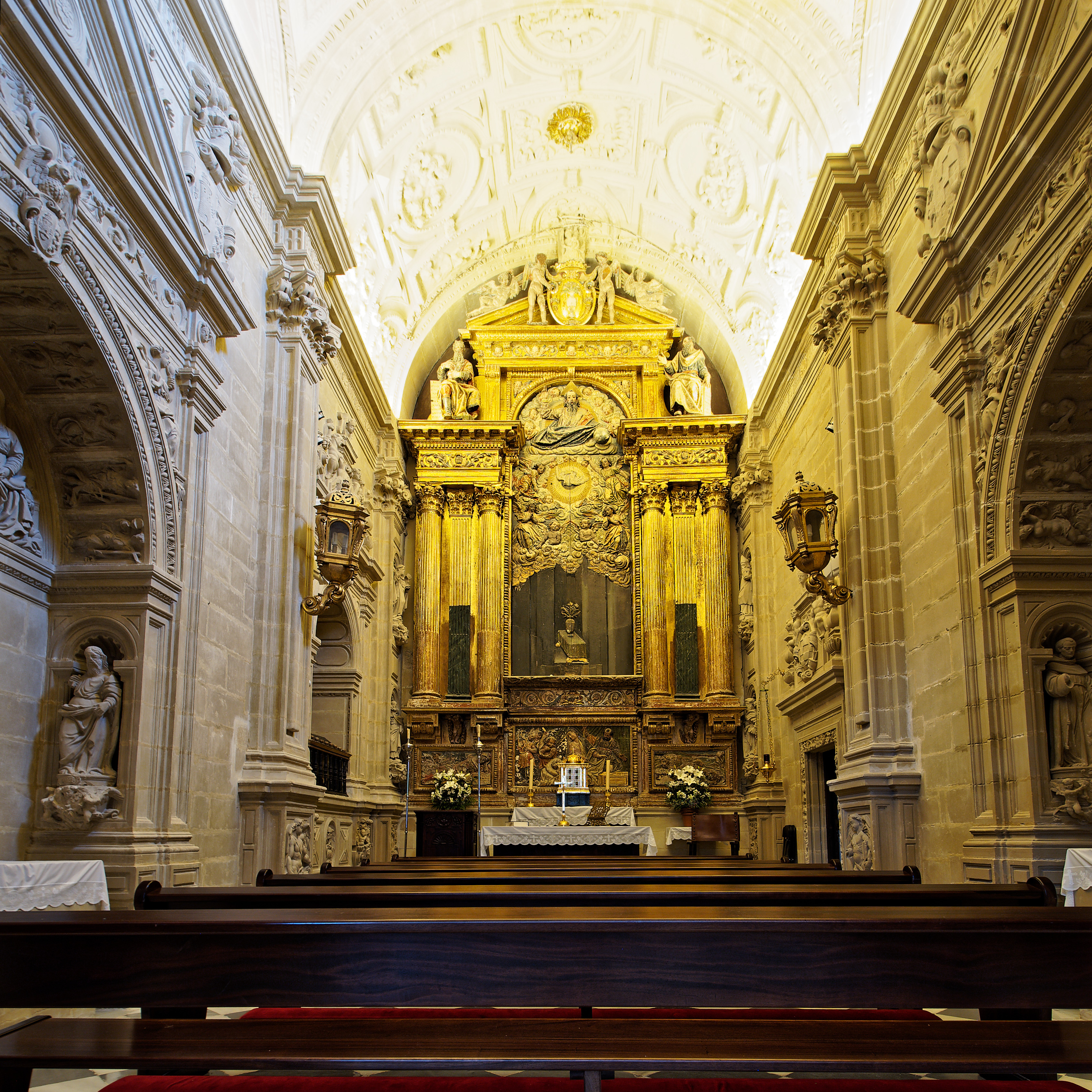 Innenausstattung der Kirche Catedral de la Natividad de Nuestra Señora in Baeza, Andalusien, Spanien. Seitenaltar